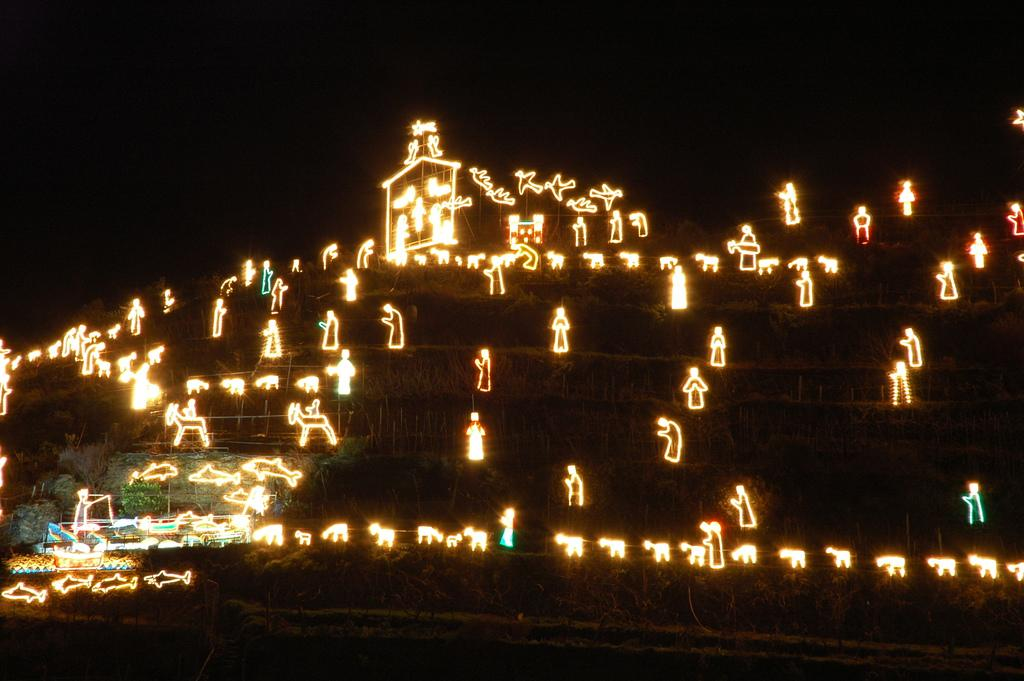 Presepe notturno di Manarola